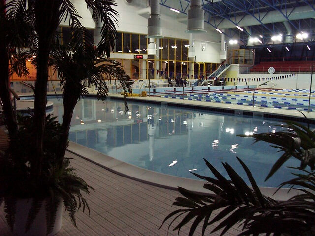 Keila ujula sisevaade